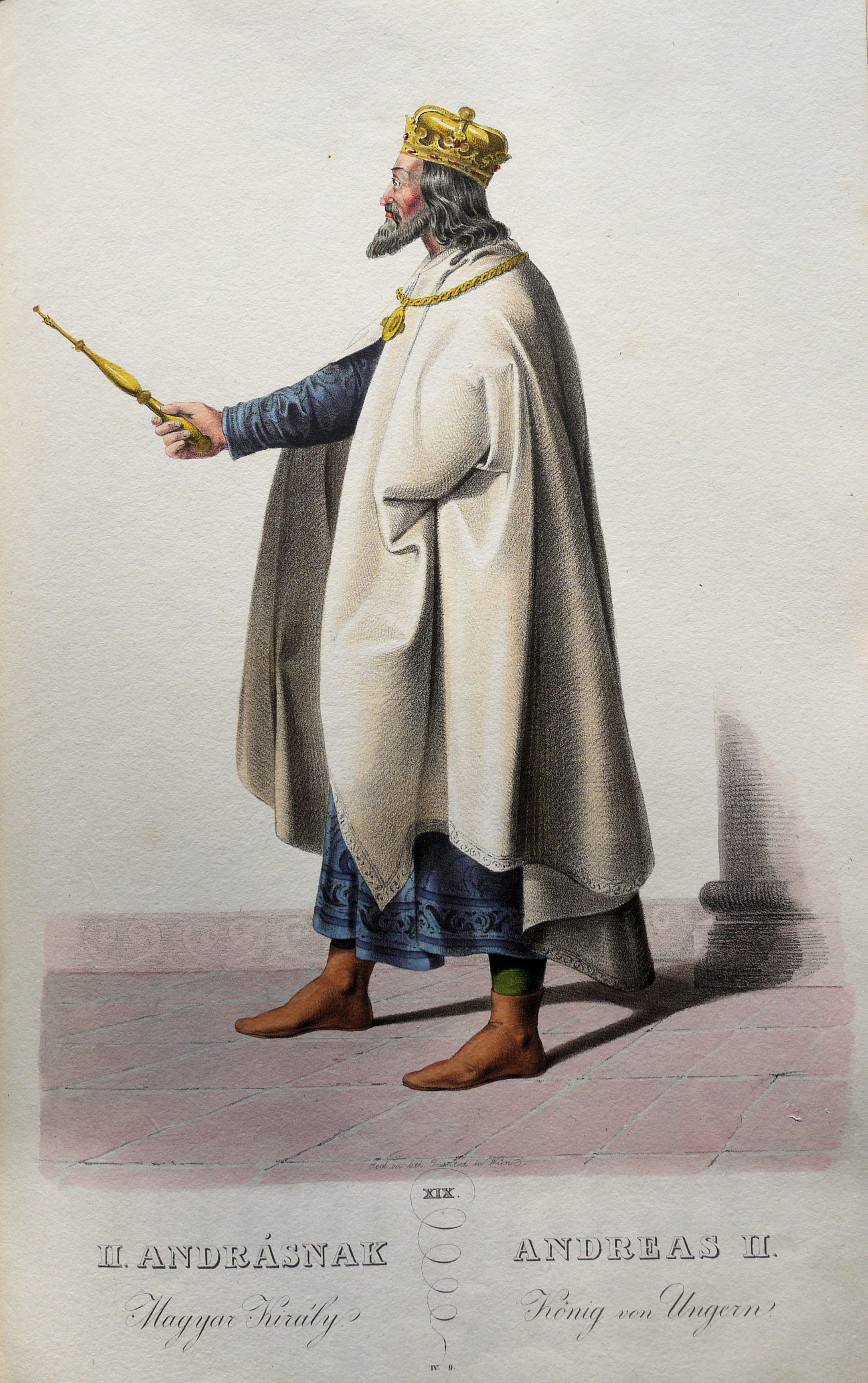 Andreas II. (1177-1235), König von Ungarn etc. Lithographie von Josef Kriehuber nach einer Zeichnung von Moritz von Schwind aus Ungerns Erste Heerführer Herzoge und Koenige In einer Reihe von Bildnissen von Bela bis auf Seine Majestät Franz I. Kaiser Von Österreich König Von Ungern &c., &c. Wien : Lithographisches Institut ;ca. 1828